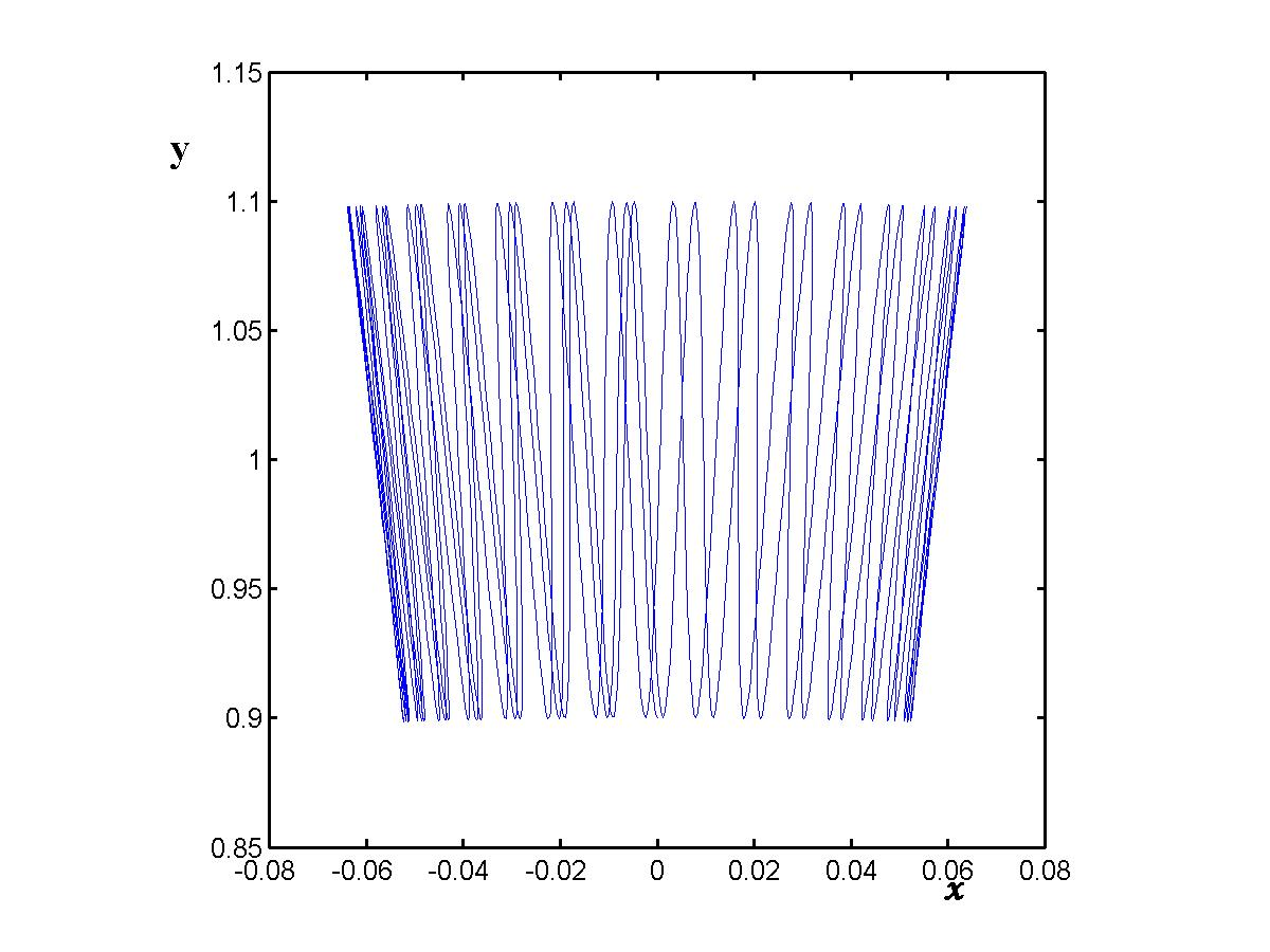 Маятник Капицы, колебания в верхней точке.